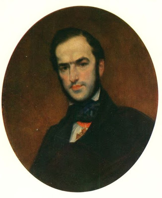 Портрет Н. Ф. Здекауэра